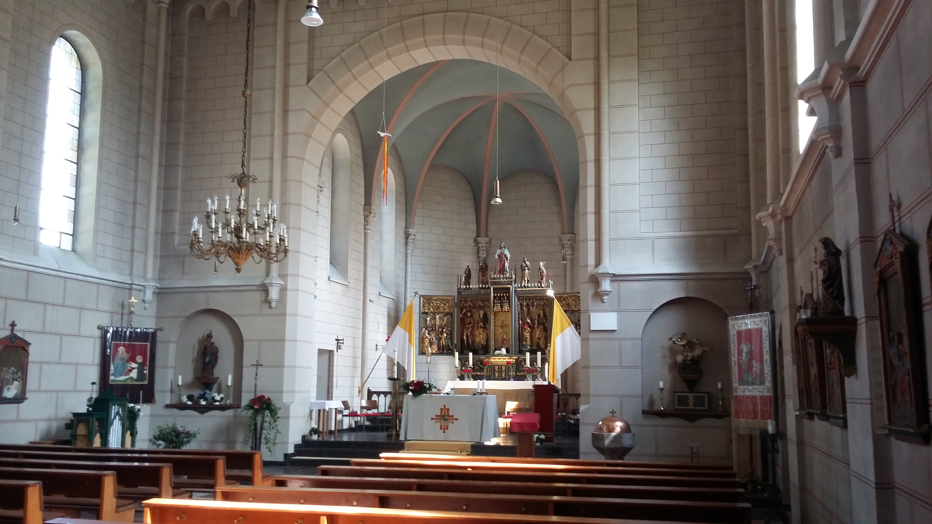 St. Georg Pfaffenwiesbach - Innenansicht nach Osten an Pfingsten 2018